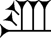 Cuneiform sign